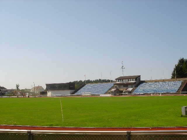 Hovedbanen og tribunen på Sandnes idrettspark